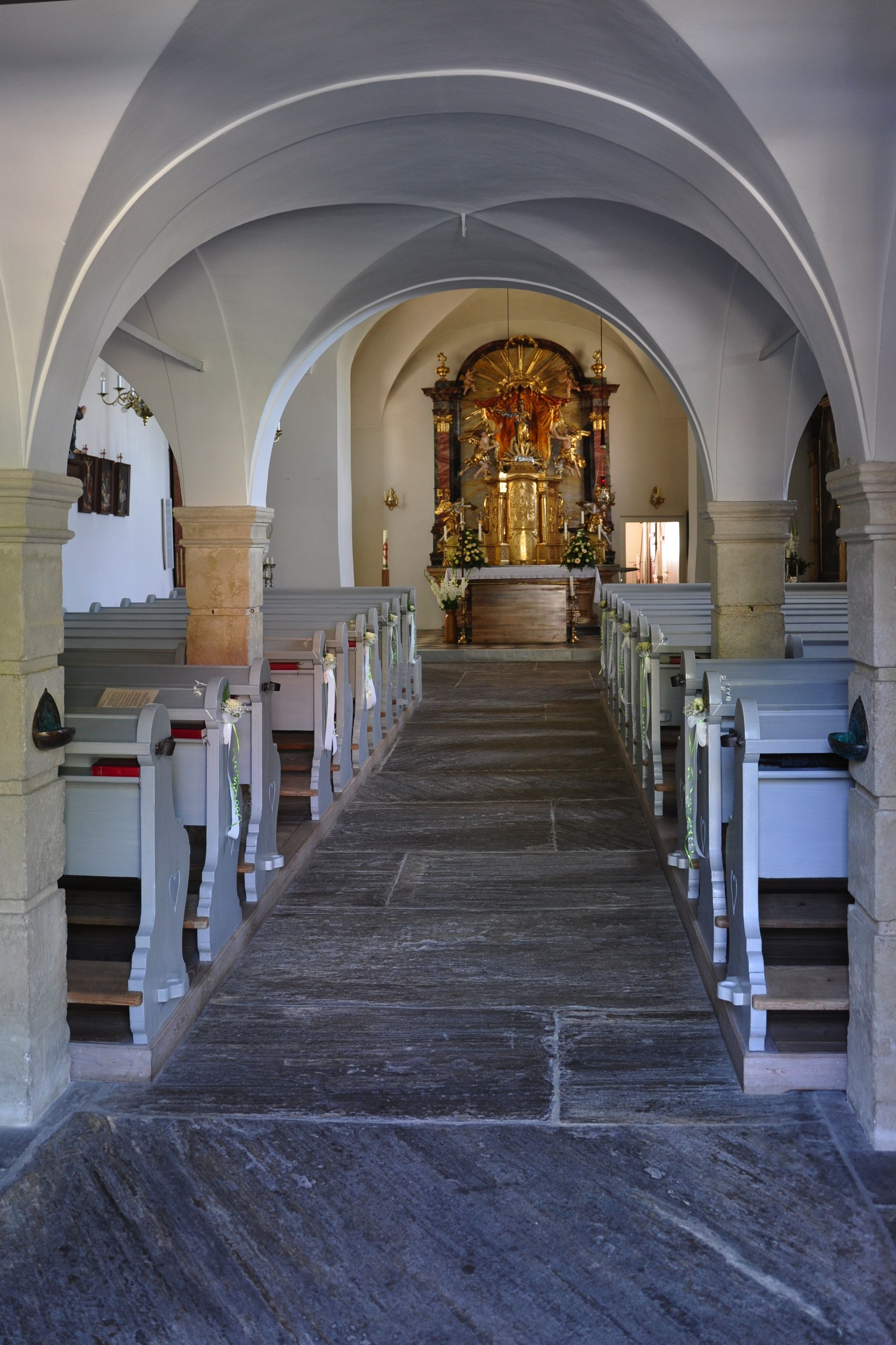 Kath. Pfarrkirche hl. Maria in Dorn und ehem. Friedhof